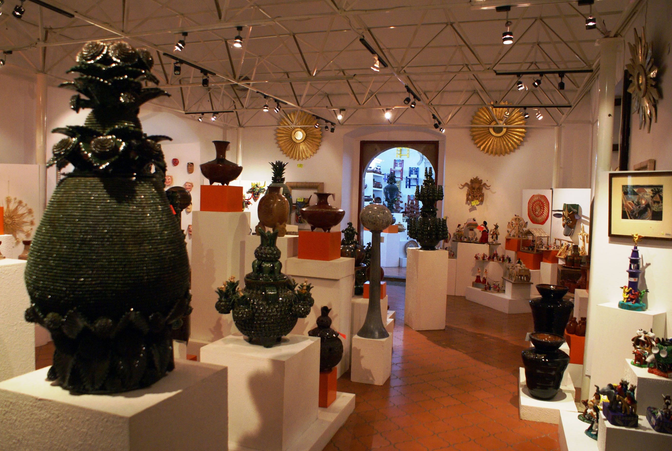 Casa de las Artesanías de Michoacán, recinto cultural público ubicado en la ciudad de Morelia, Michoacán, México; enfocado en la conservación y difusión del arte popular de las distintas regiones del estado, tiene su sede en un ex convento del siglo XVI.